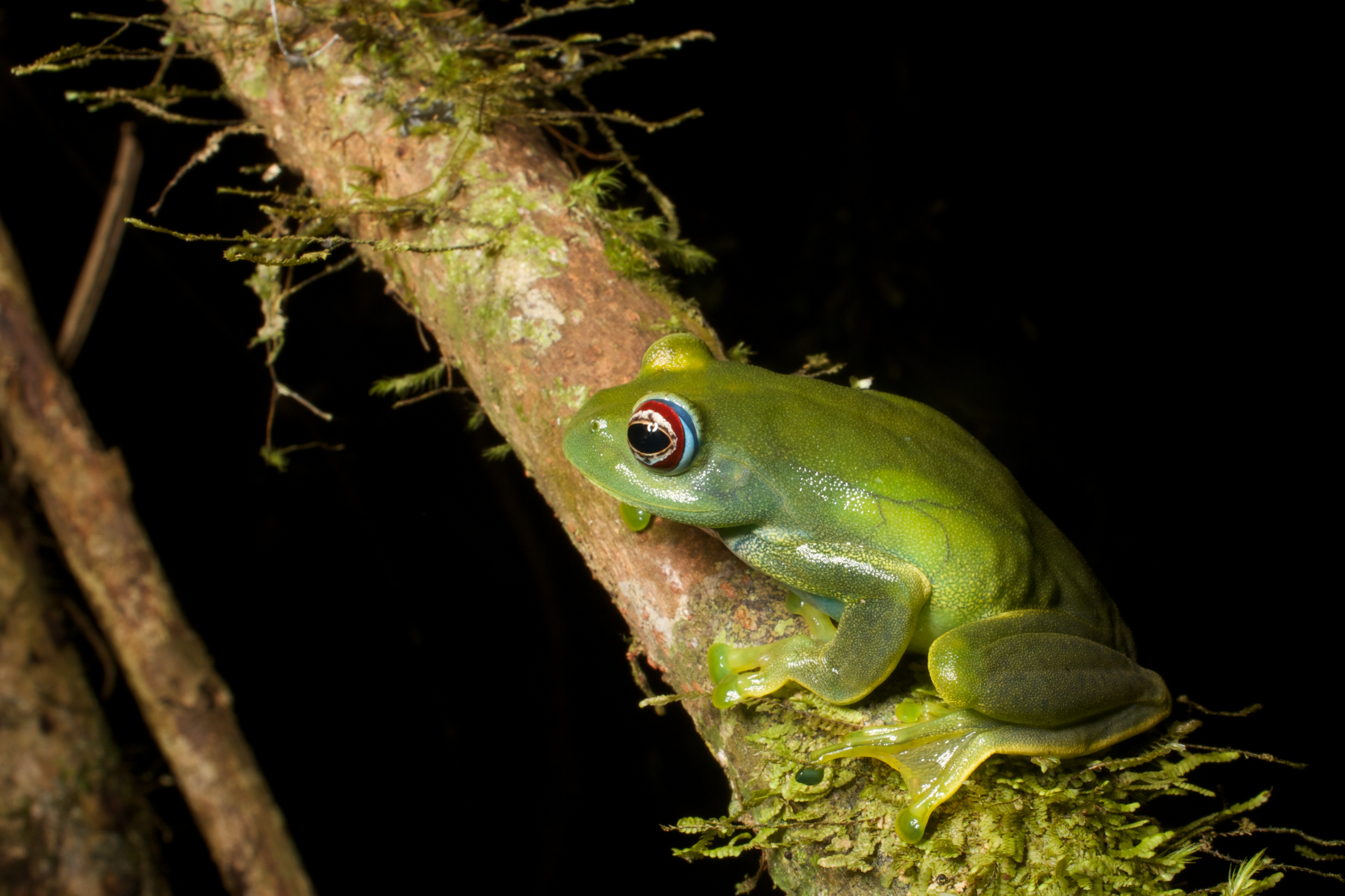 Boophis luteus